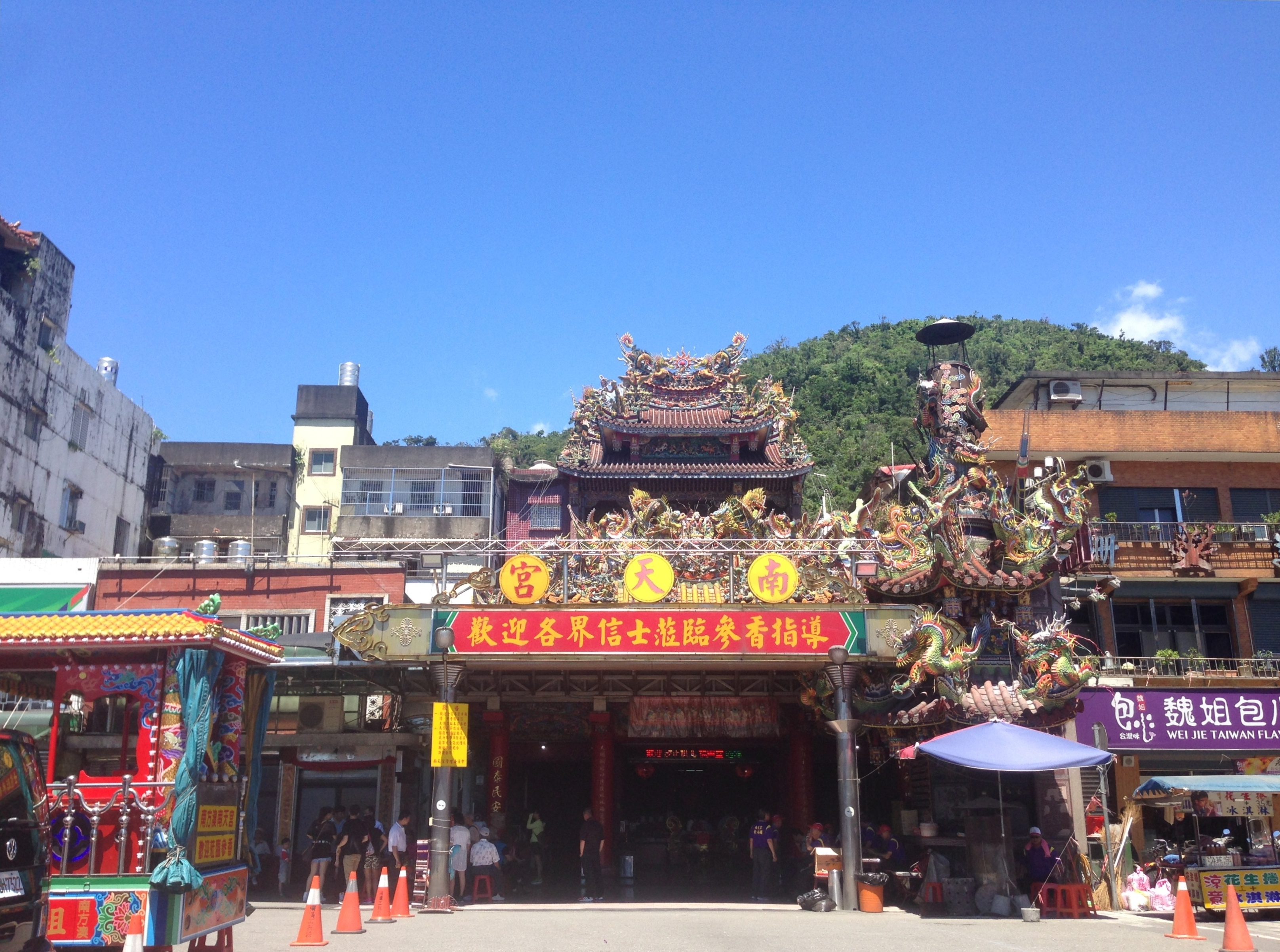 蘇澳鎮南方澳南天宮